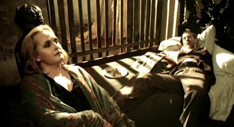 Screenshot del film Novecento (1976)